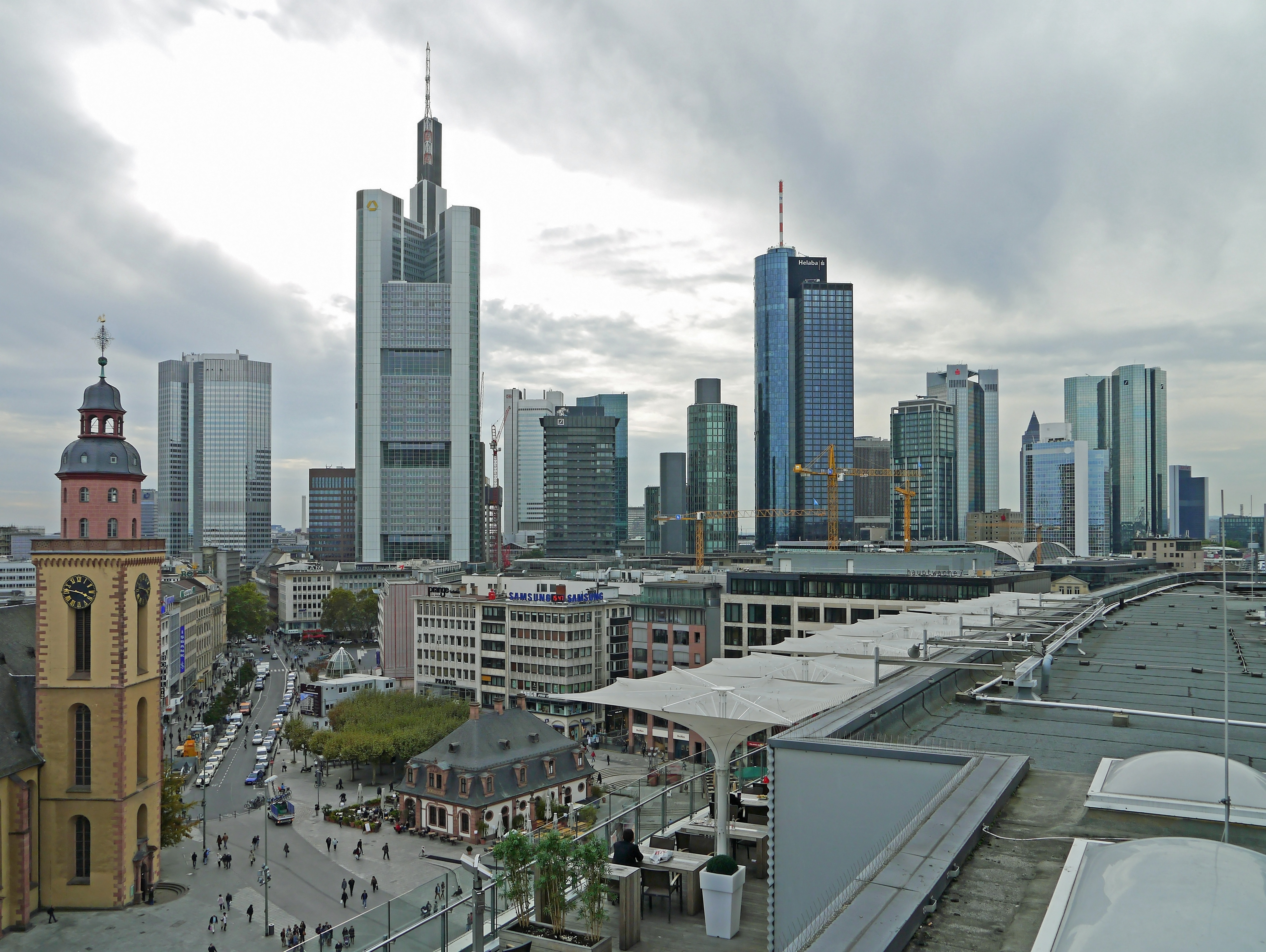 Innenstadt-Panorama (2012) in sued-westlicher Richtung von der Zeilgalerie in Frankfurt am Main.